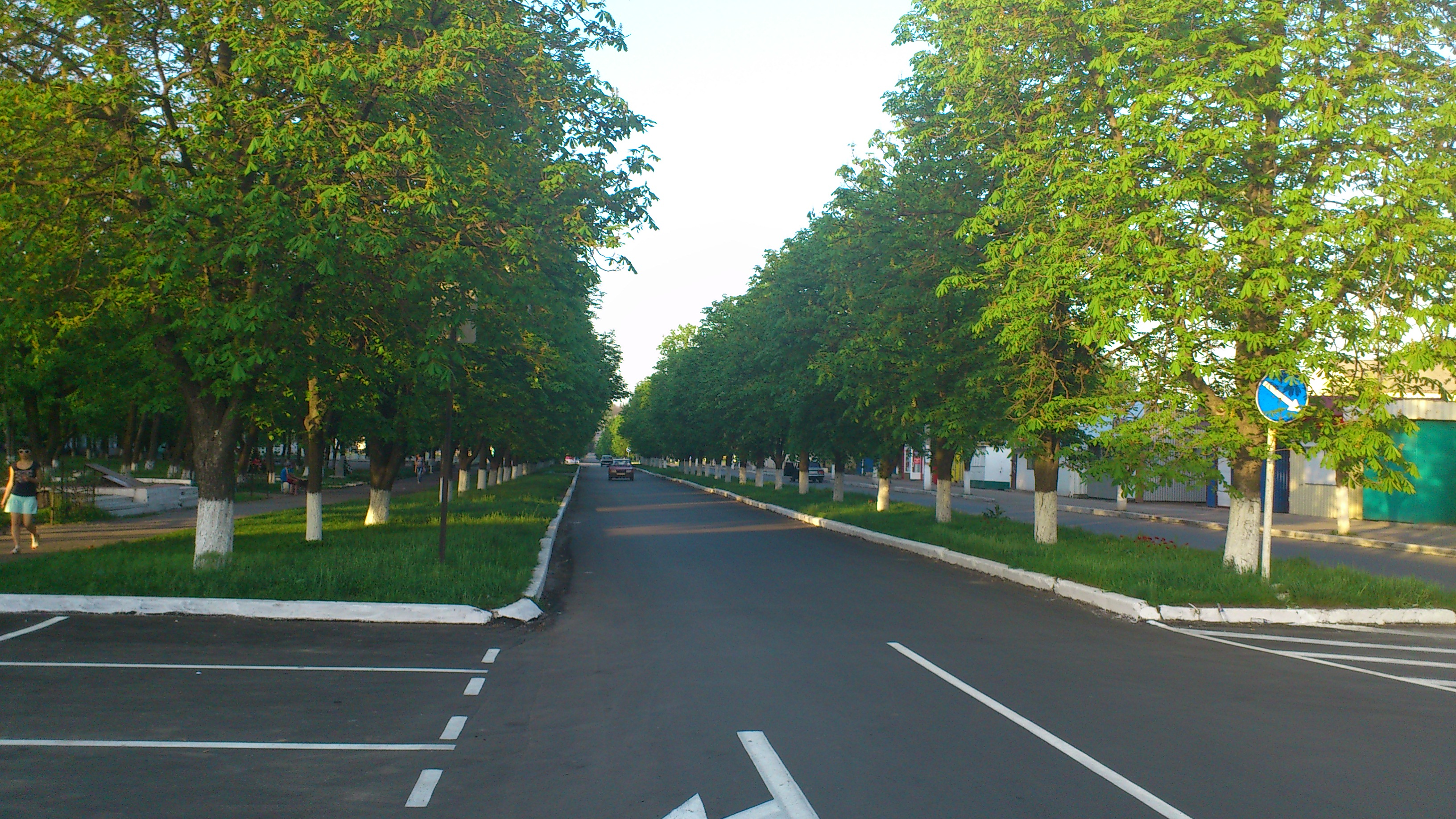 Центральна вулиця Новоархангельська (Леніна ?)